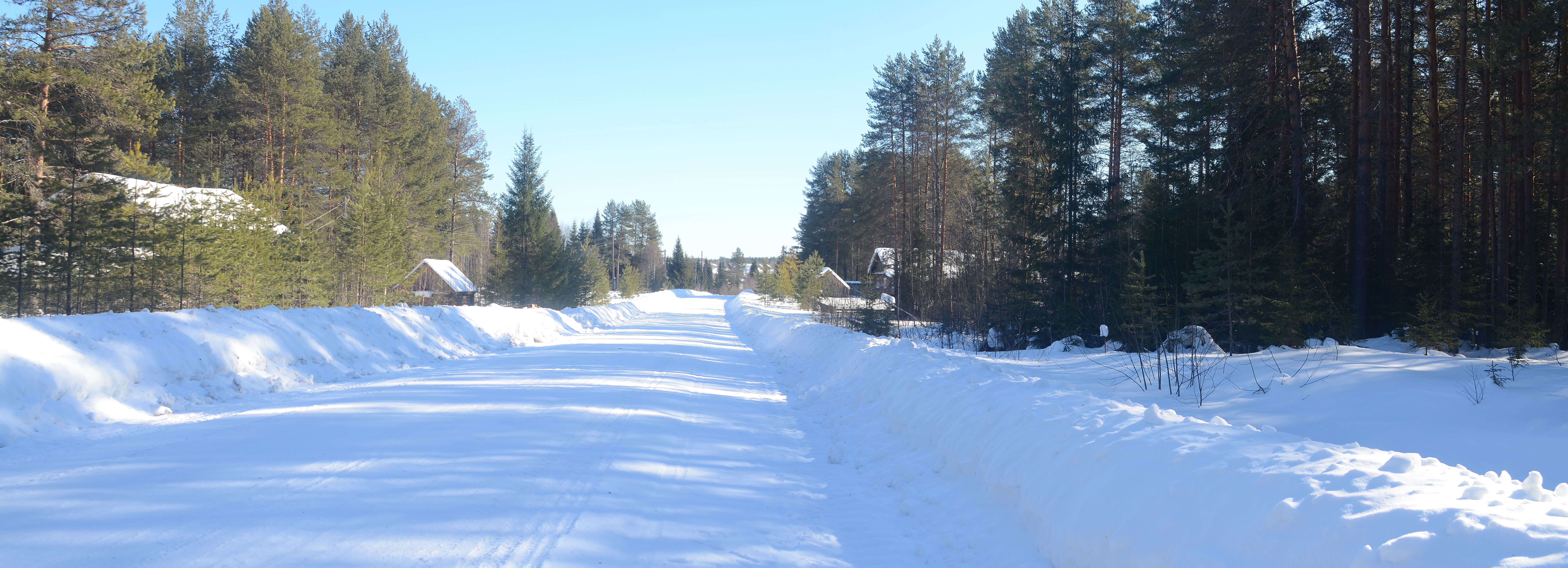 По дороге